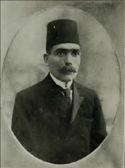 سعادة العالم الفاضل رفيق بك العظم، رئيس حزب اللامركزية الإدارية العثماني.